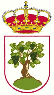 Escudo oficial del Ayuntamiento de La Parra en la provincia de Badajoz, Extremadura, España